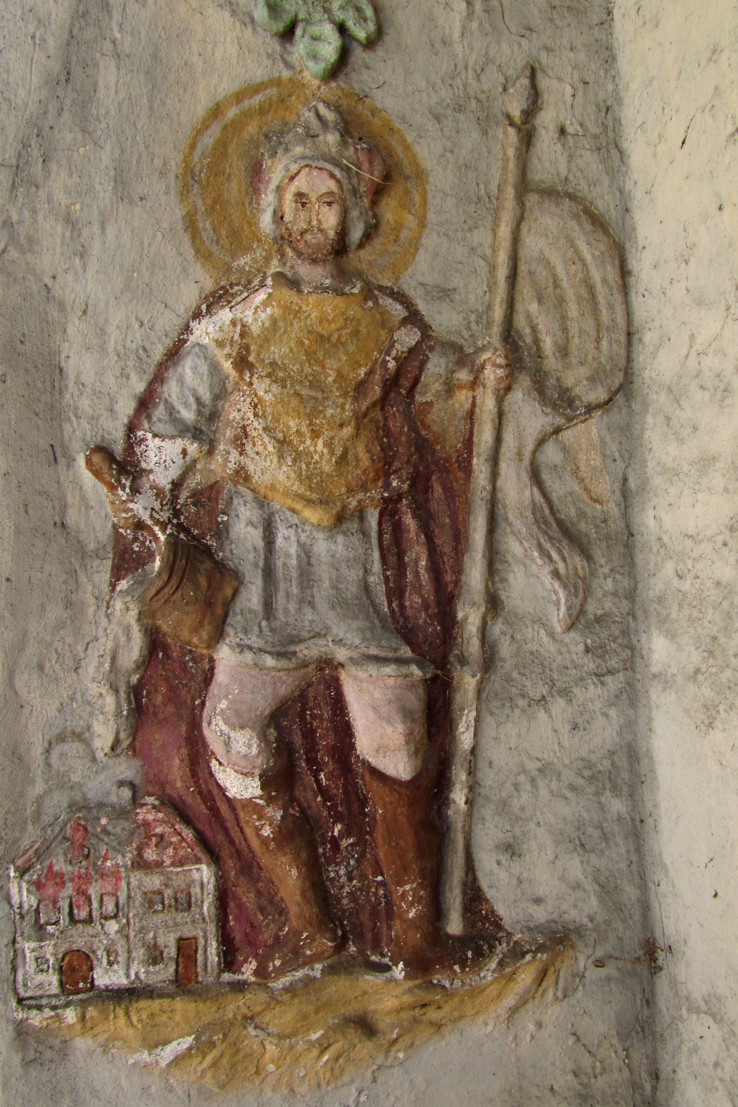 Gemälde- Relief des hl Florian in der barocken Wegkapelle, wahrscheinlich aus der ersten Hälfte des 18. Jahrhunderts.